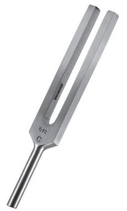 ध्वनीच्या नियतकालीन हालचाली साठी वापरला जातो